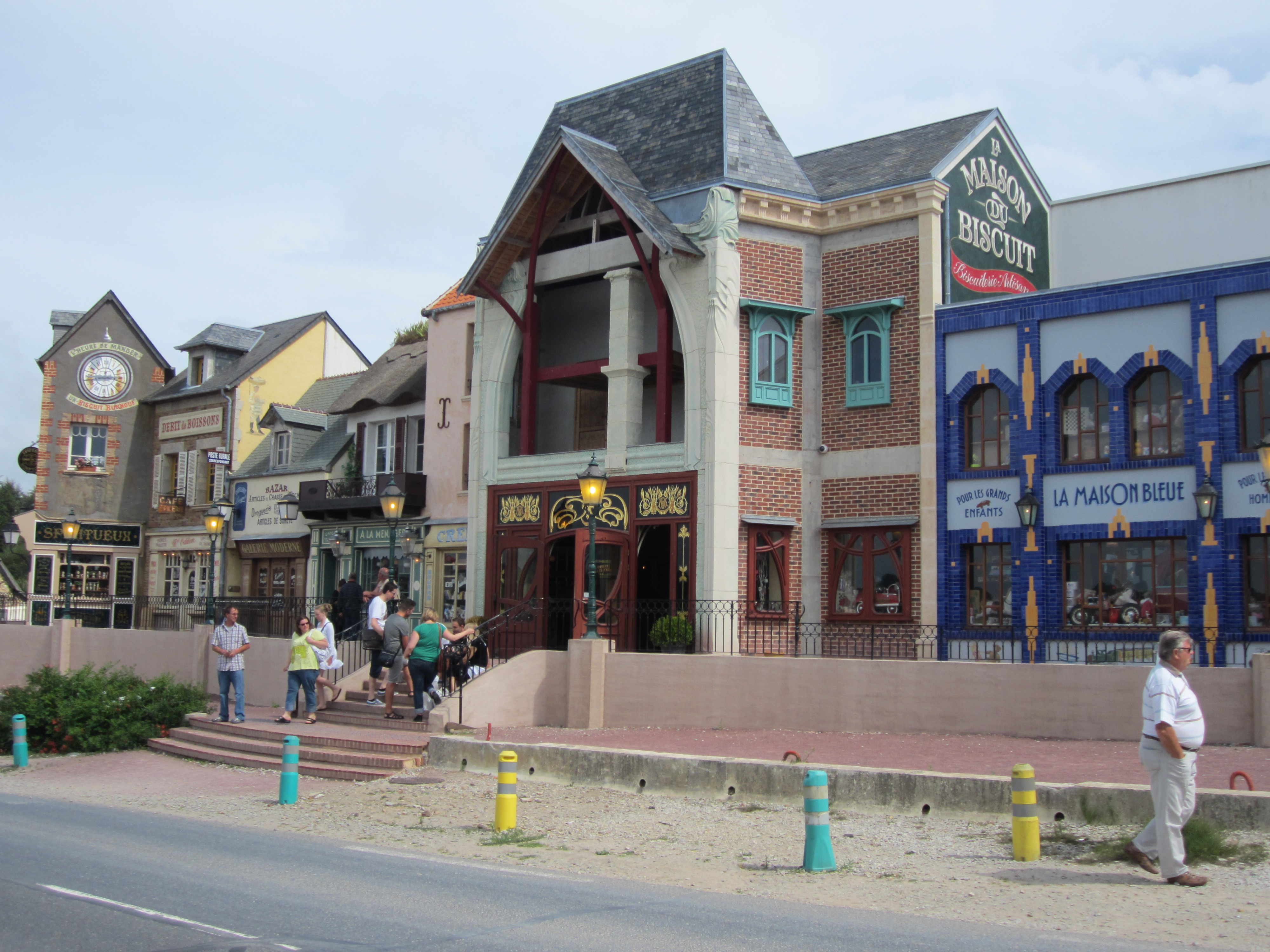 La Maison du biscuit de Sortosville-en-Beaumont